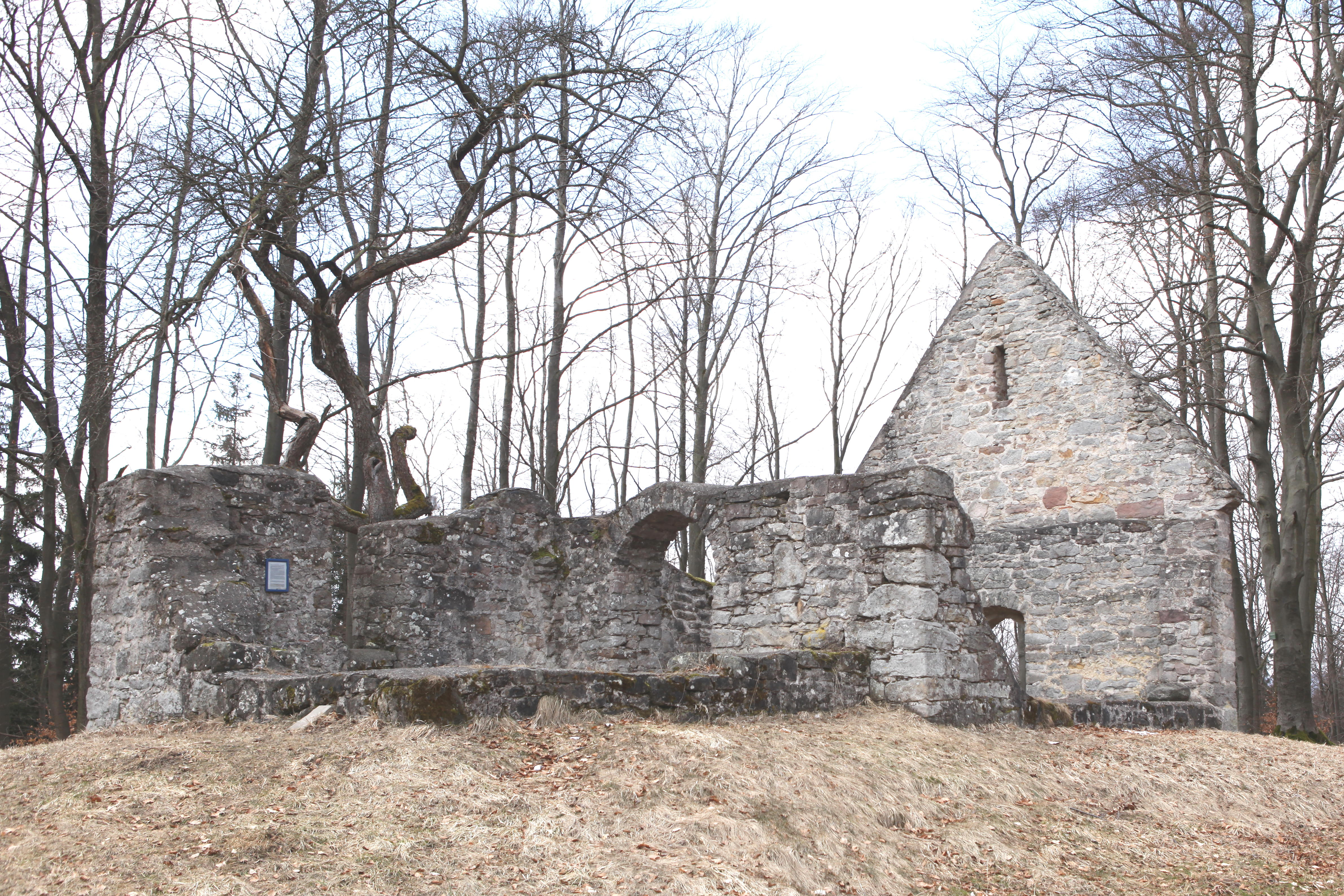 Ruine der Ottilienkapelle auf dem Ehrenberg, Landkreis Hildburghausen